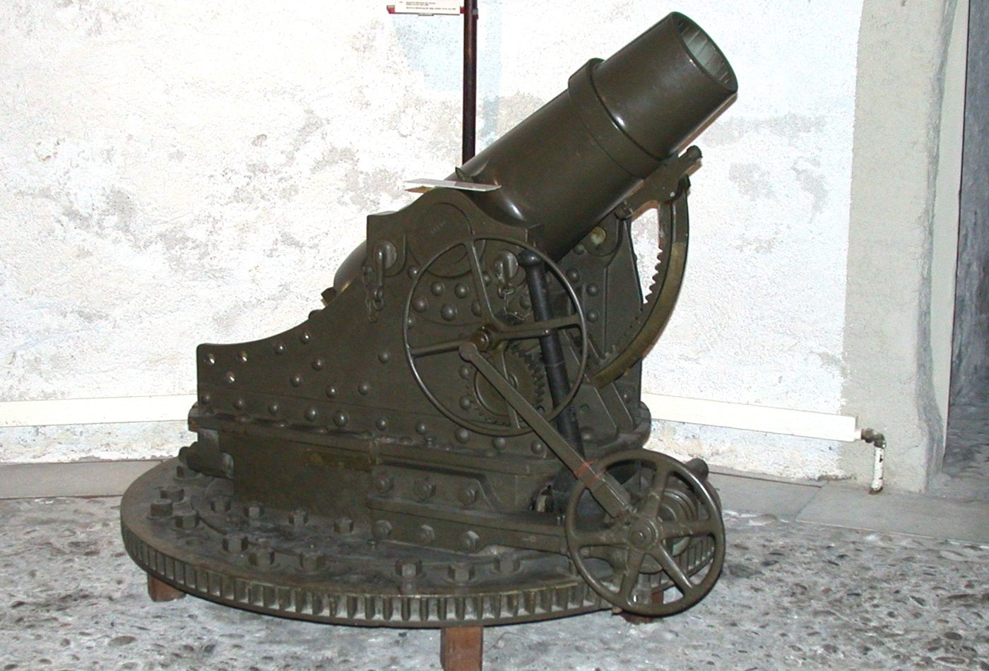 15 cm Positionsmörser Schweiz Ord. 1883, Krupp, Standort Musée Militaire Vaudois, 1110 Morges, Schweiz